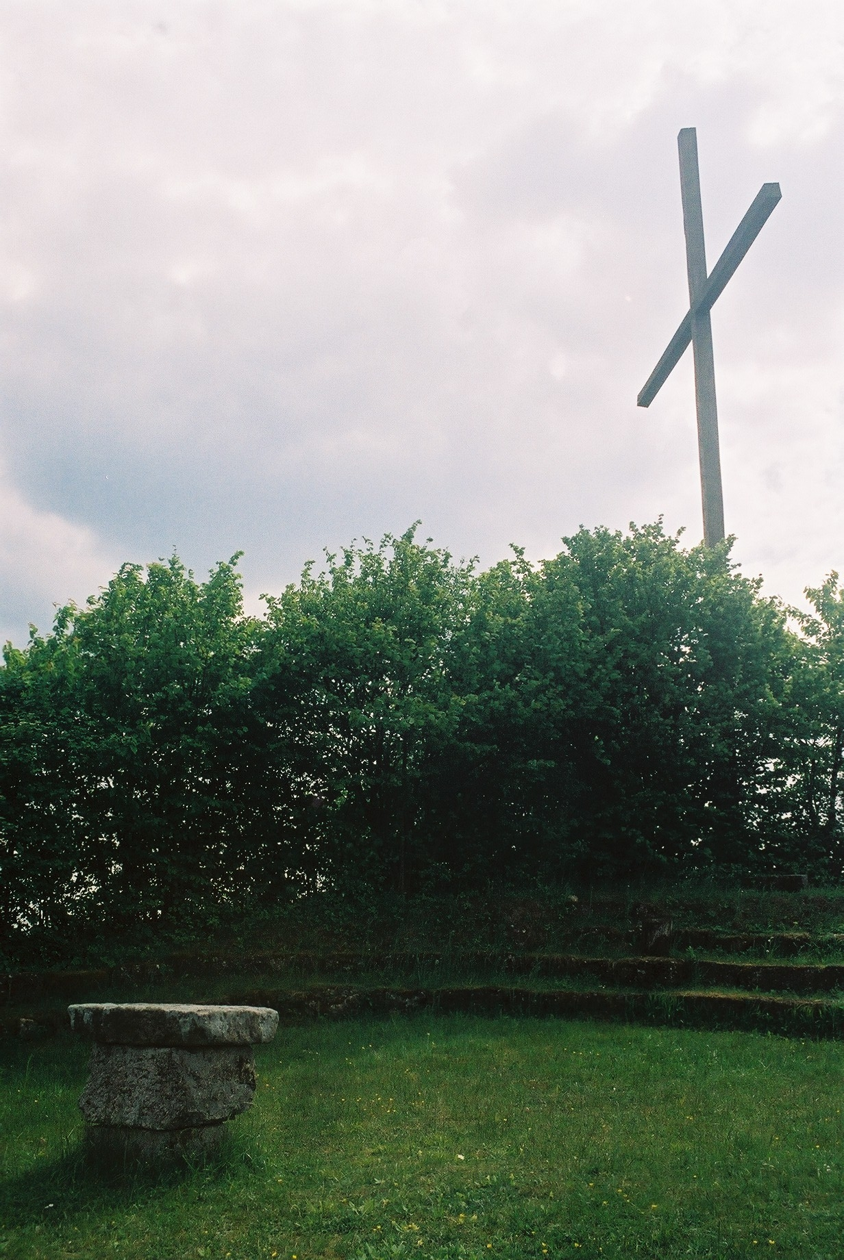 memorial for Adam von Trott zu Solz at Imshausen near Bebra